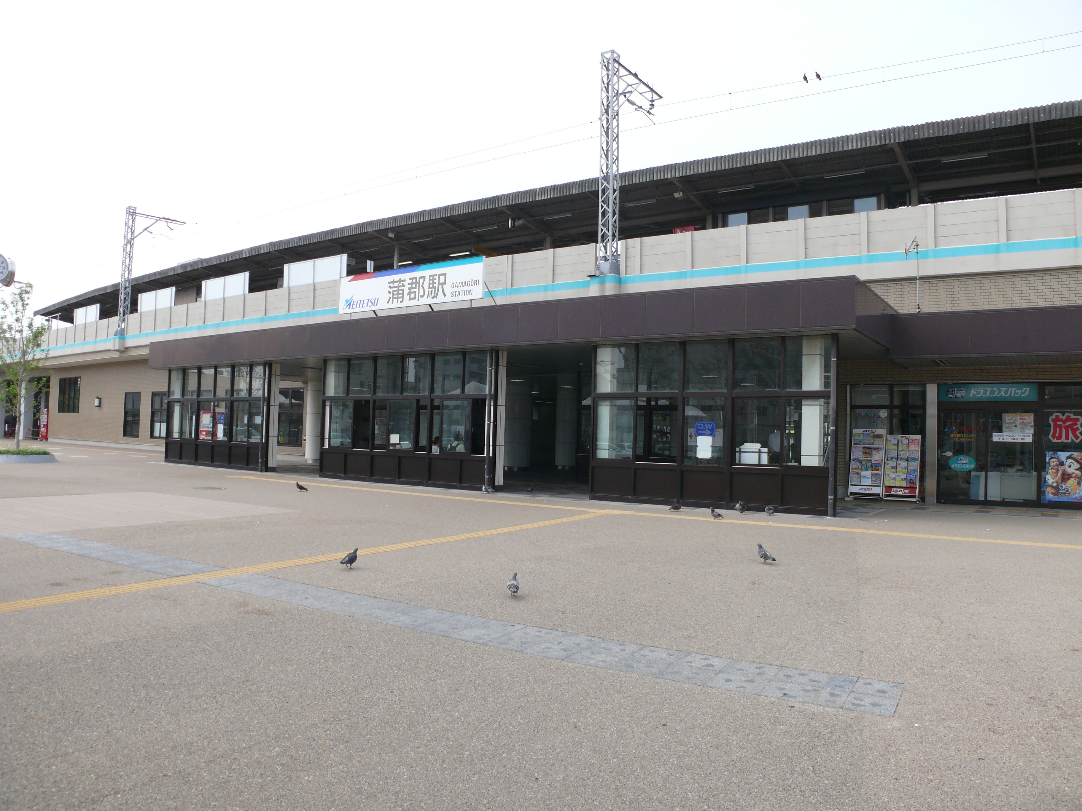 愛知県蒲郡市にある名古屋鉄道の蒲郡駅